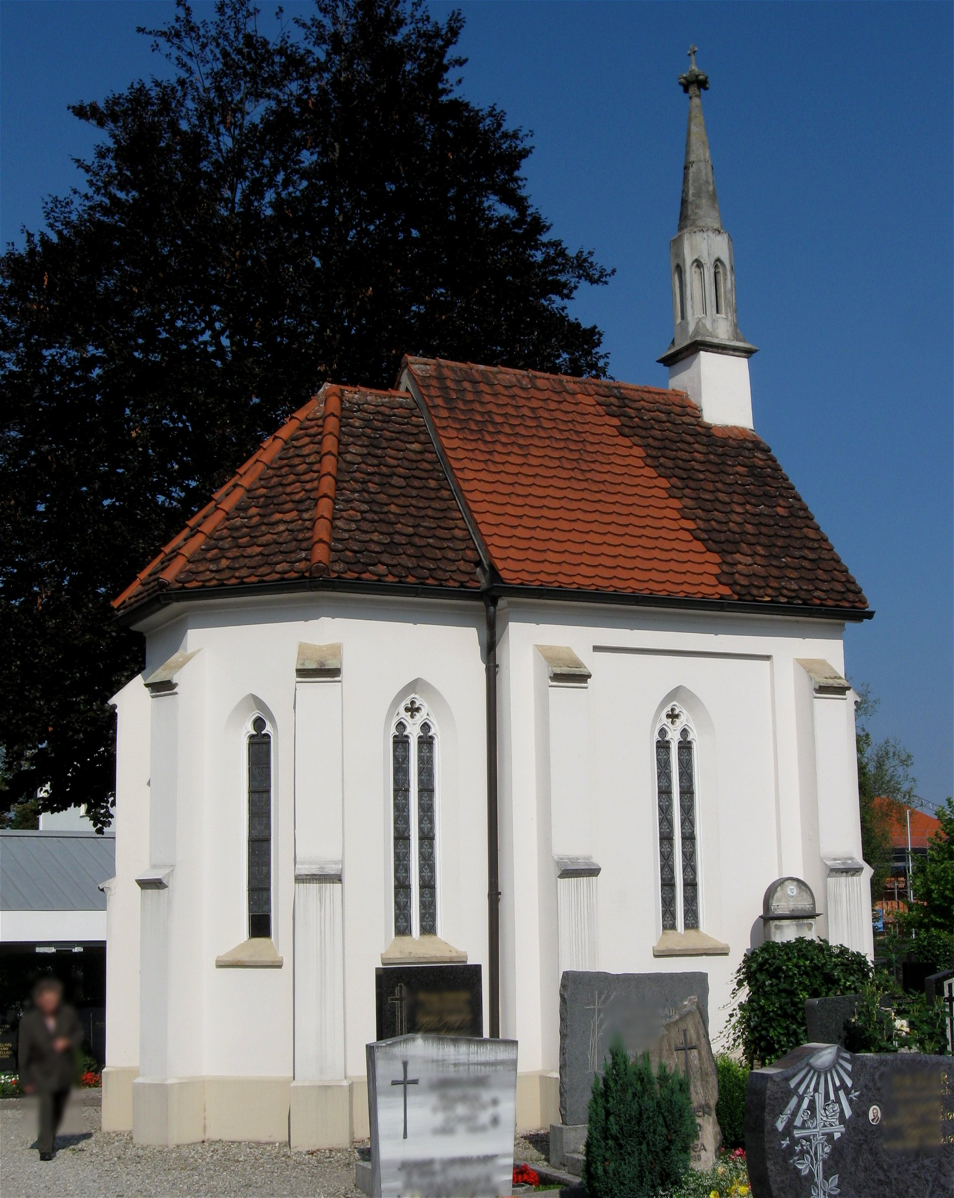 Kienberger Straße 2; Friedhofskapelle, neugotisch, 1870; mit Ausstattung.